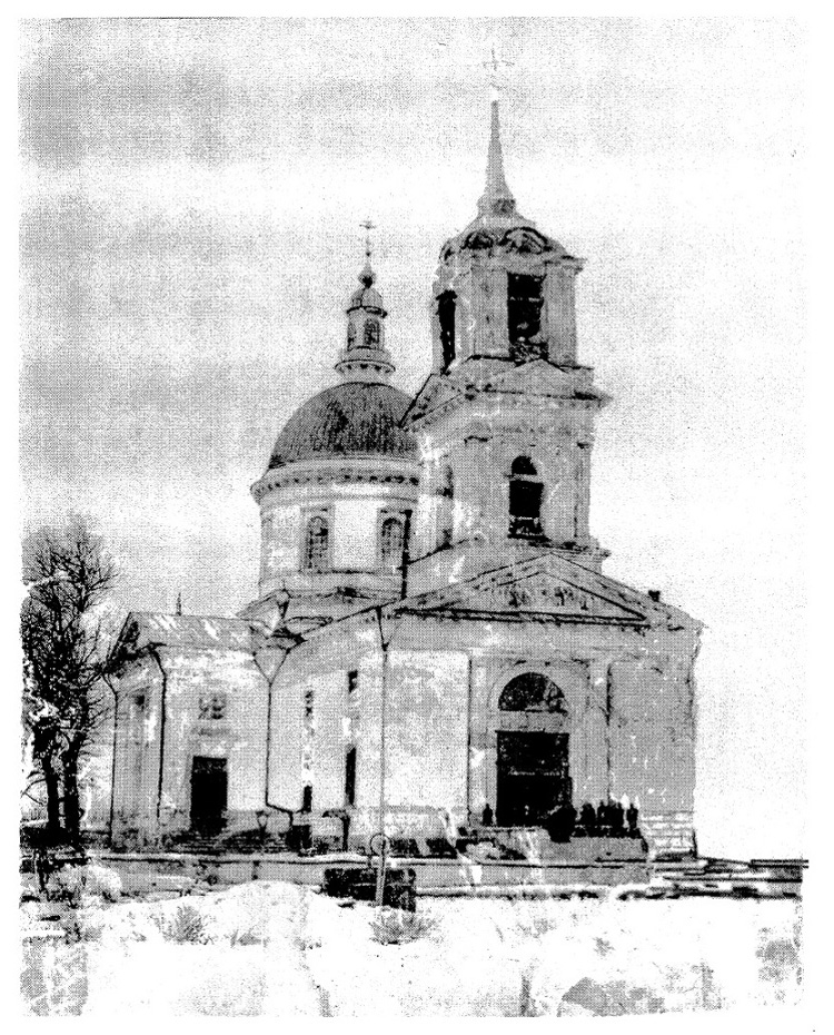 Церковь Покрова Пресвятой Богородицы в станице Елизаветинской (уничтожена в 1937), Азовский район Ростовской области.